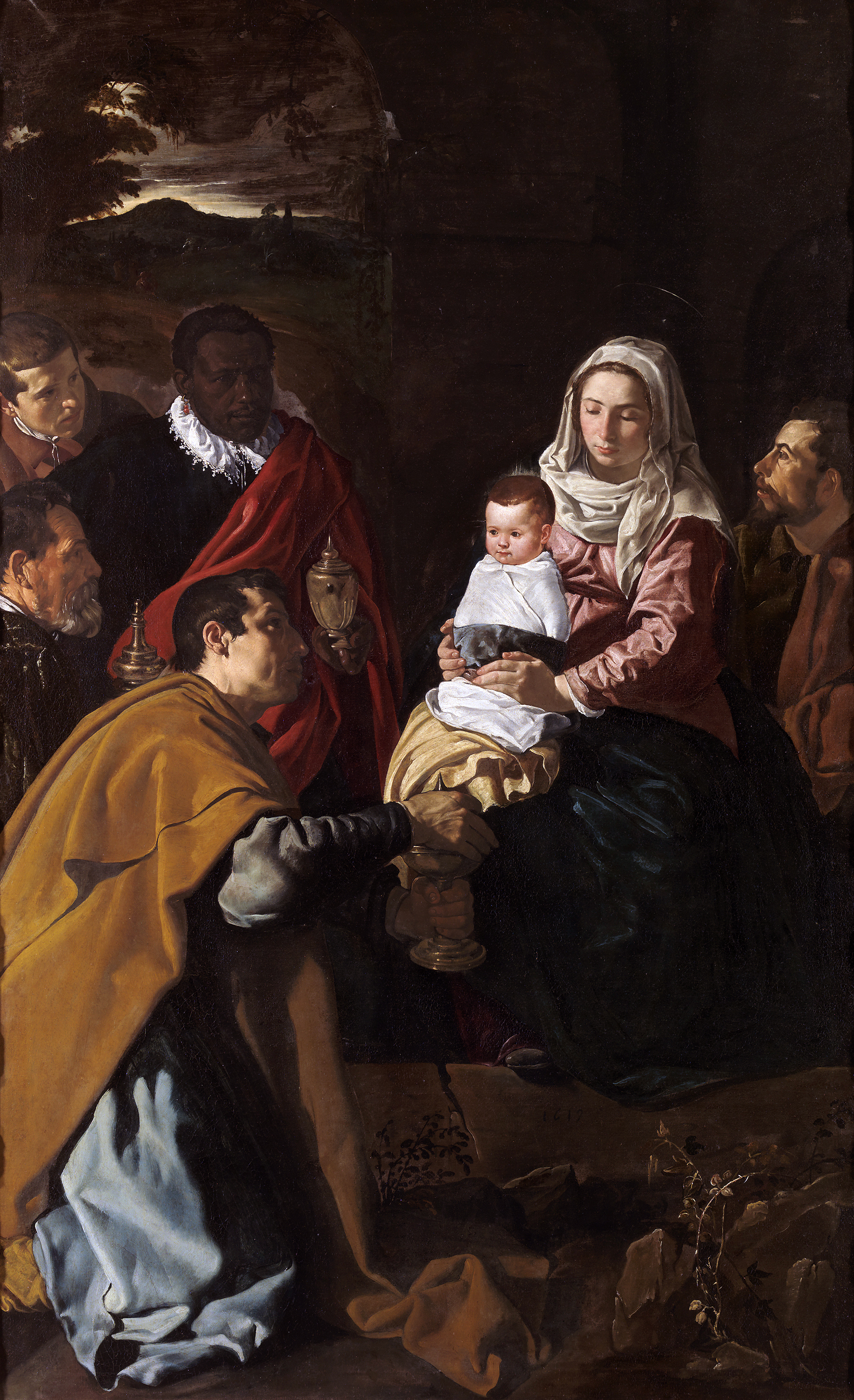 La obra representa el momento en que el Niño Jesús fue adorado por los tres Reyes magos.